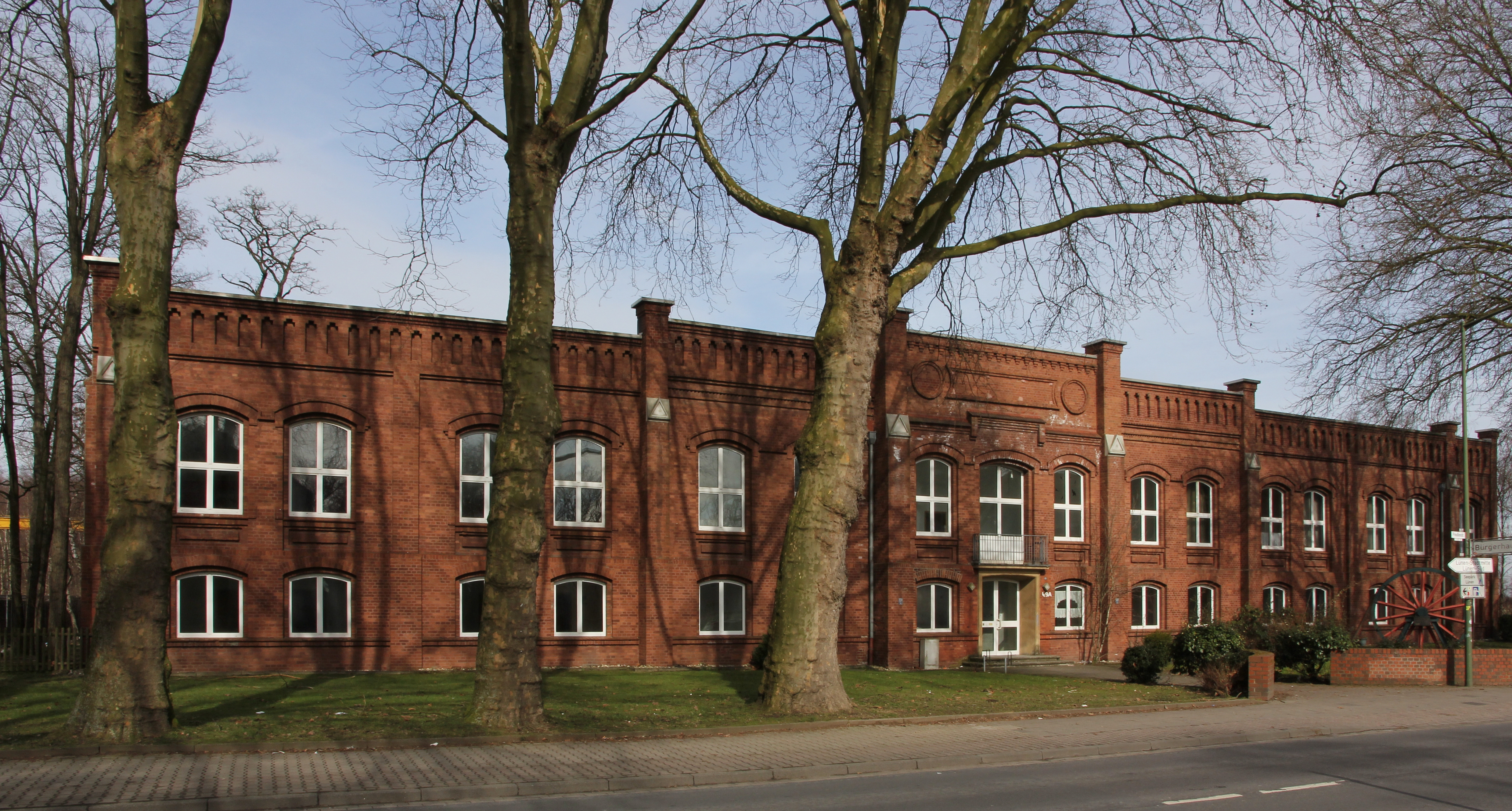 Ehemaliges Verwaltungsgebäude der Zeche Preussen in Lünen